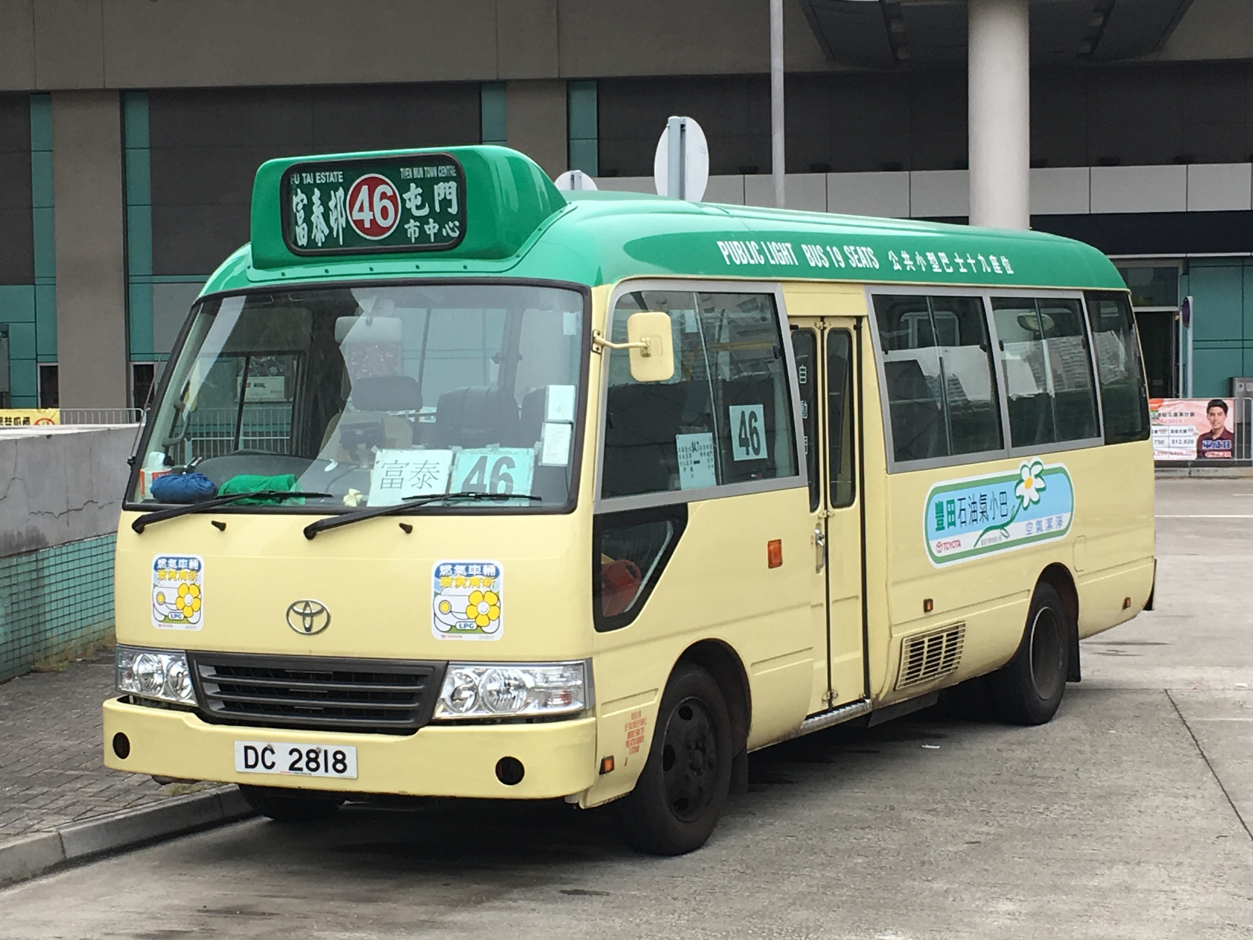 This photo is taken in Siu Hong Station.